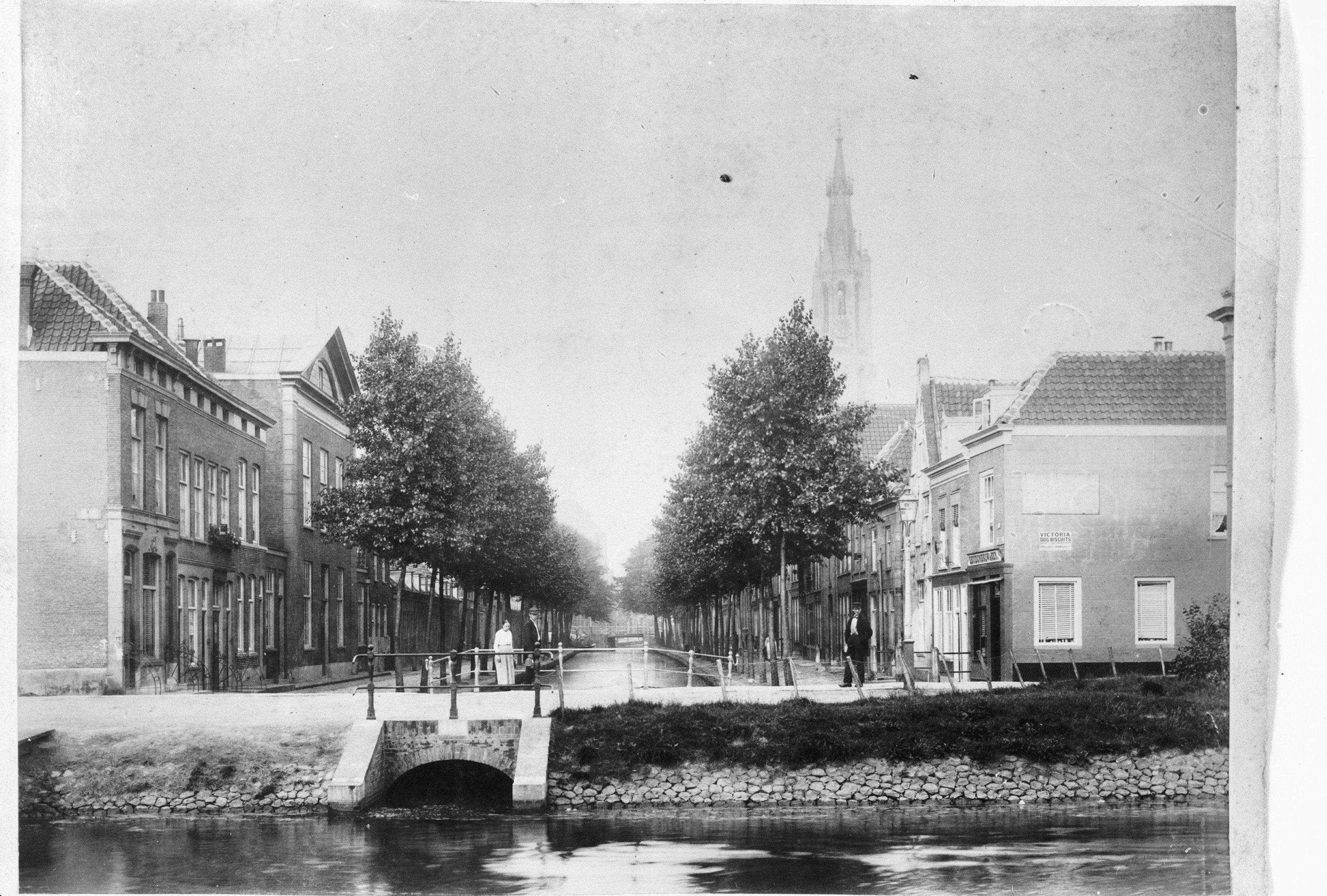 Woonhuizen N.: Nieuwe Langedijk ca. 1900